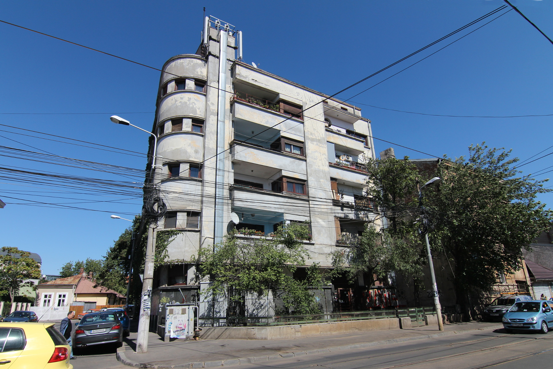 Casă pe Calea Călărașilor